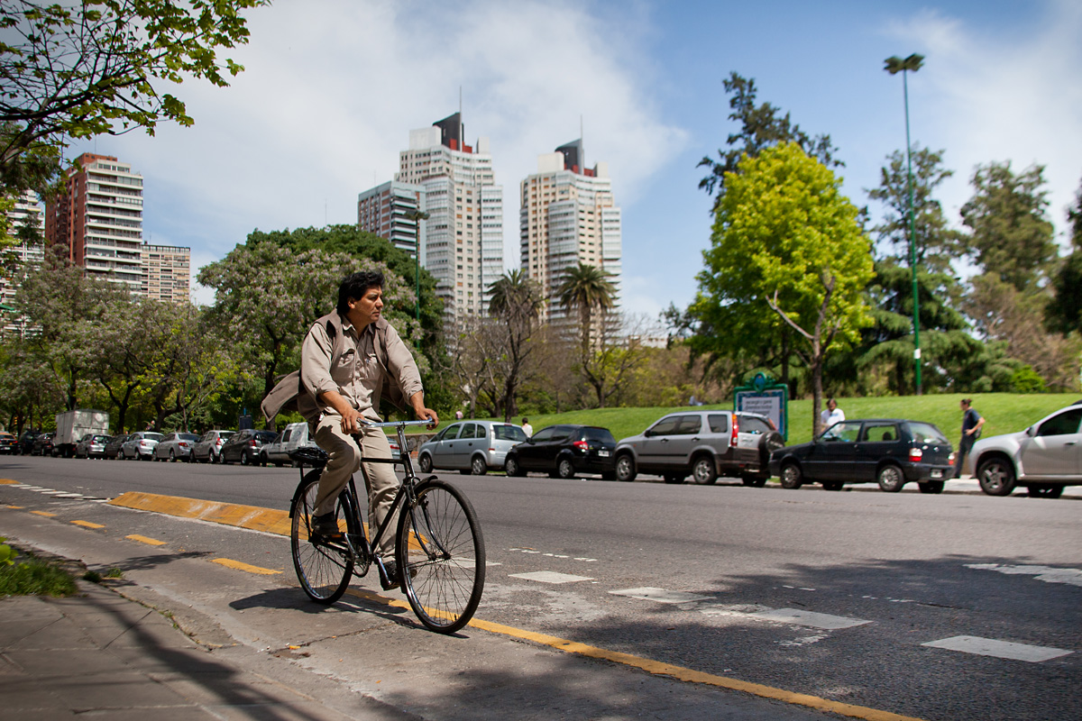 Foto: Estrella Herrera